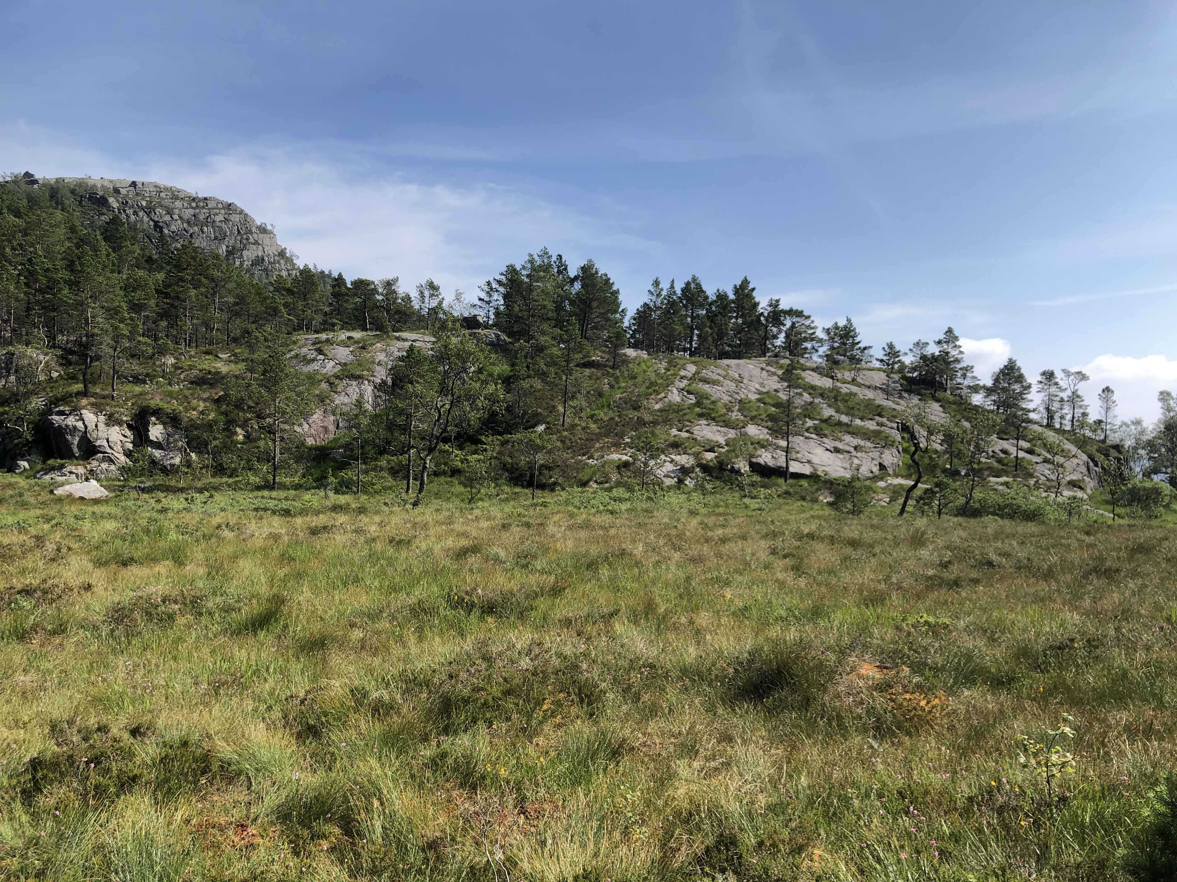 Krogabekkmyra, Moor in Norwegen